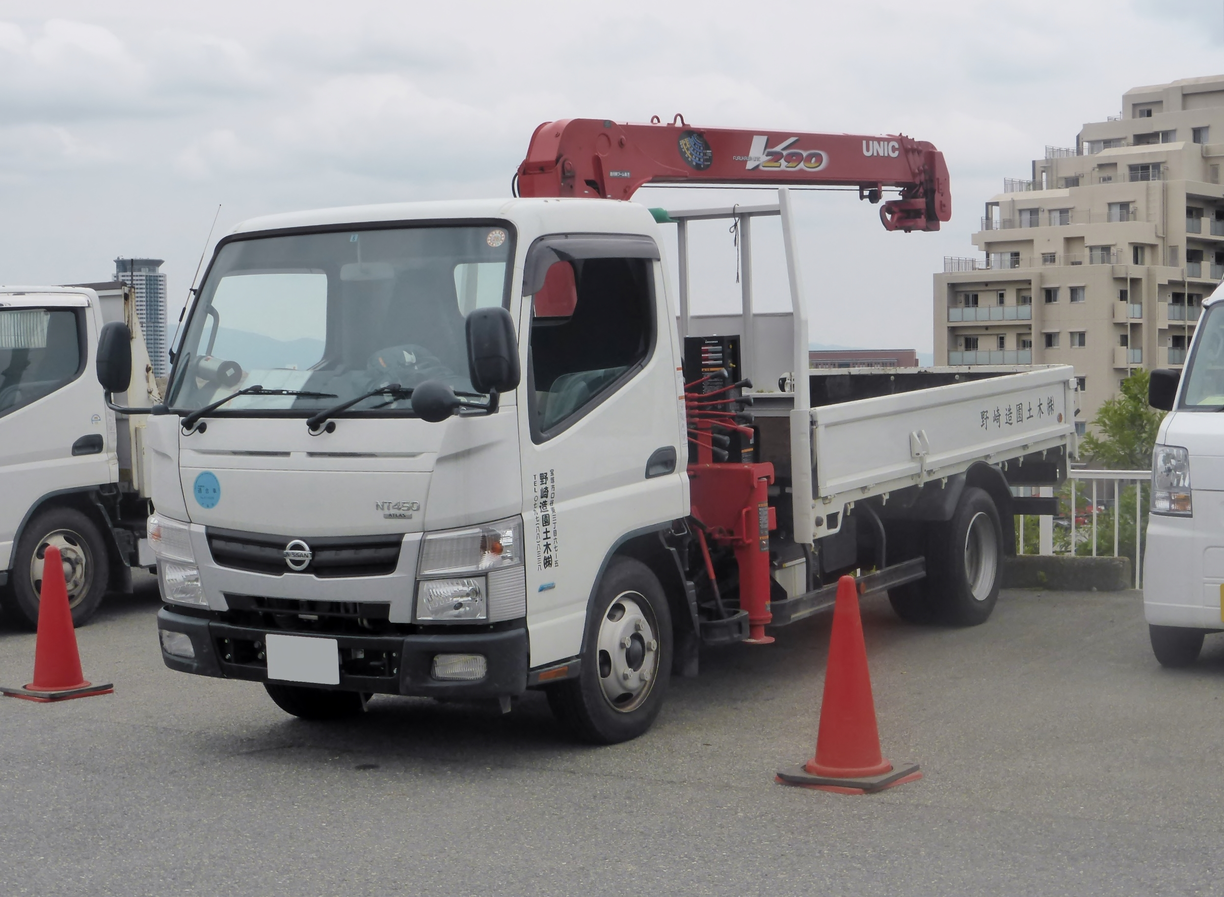 H44型日産・NT450アトラスダンプ4WDフルスーパーローをフロントから撮影。